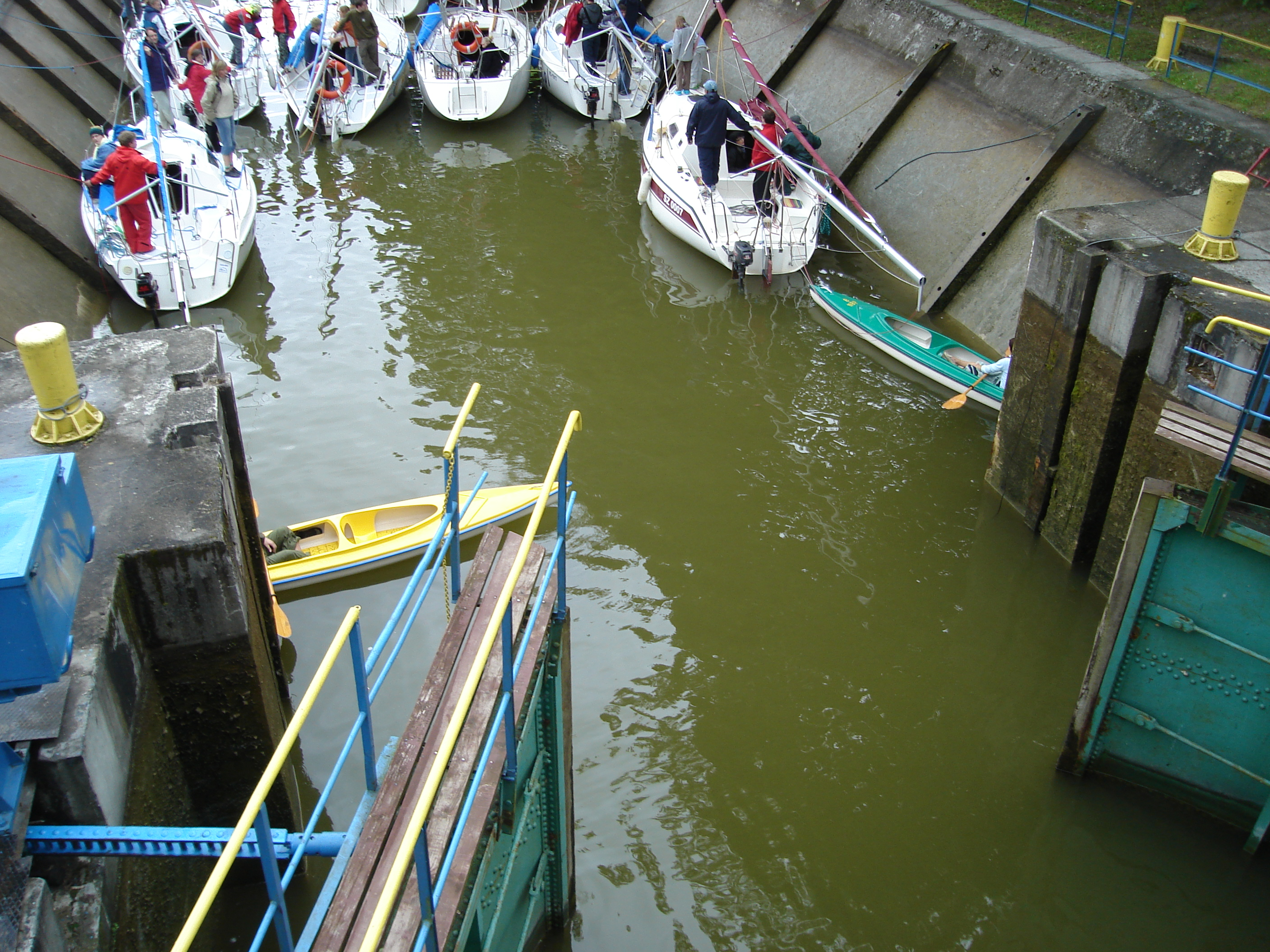 Śluza Guzianka. Zamykanie wrót śluzy